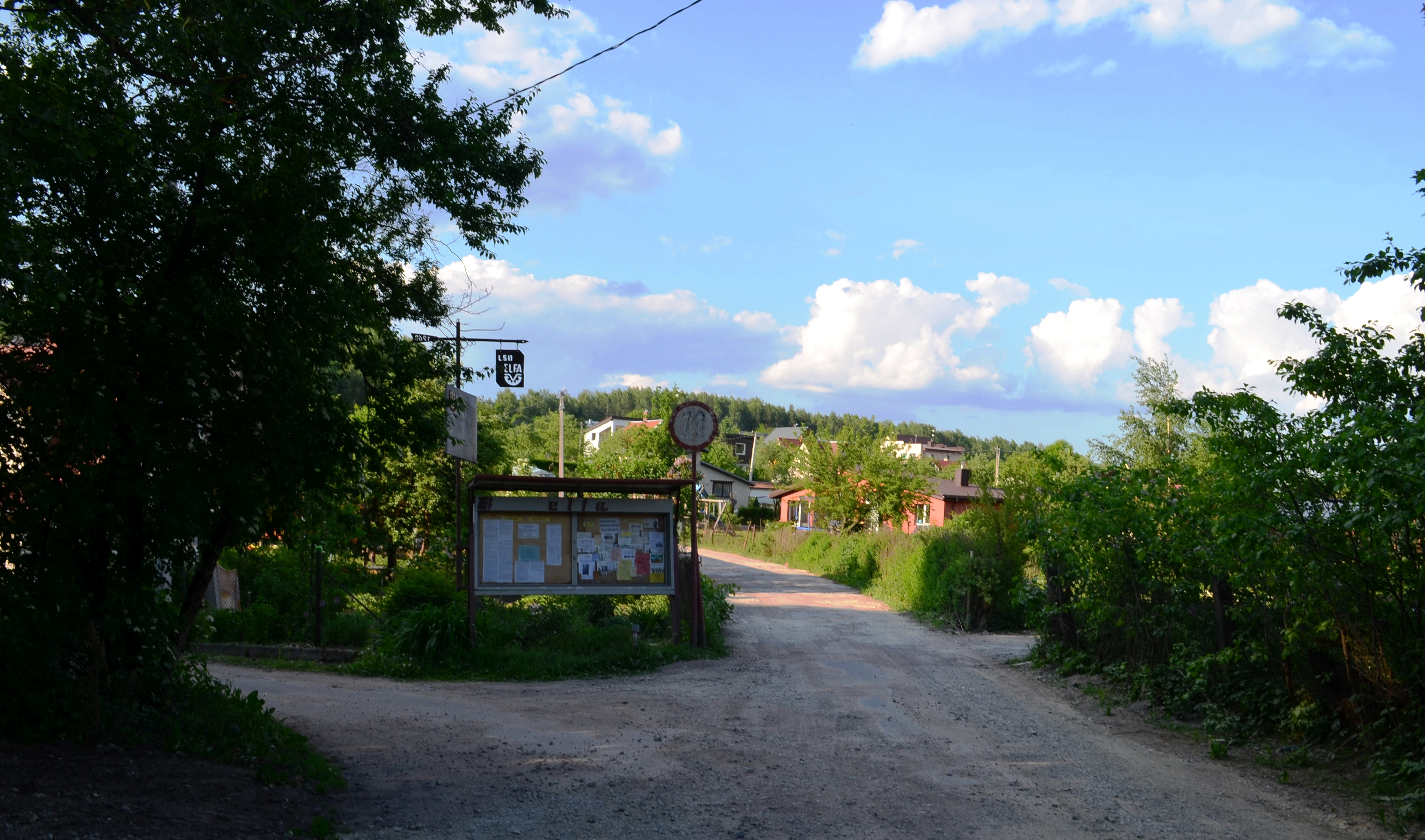 SB Elfa, Rokantiškių sodai, Vilnius